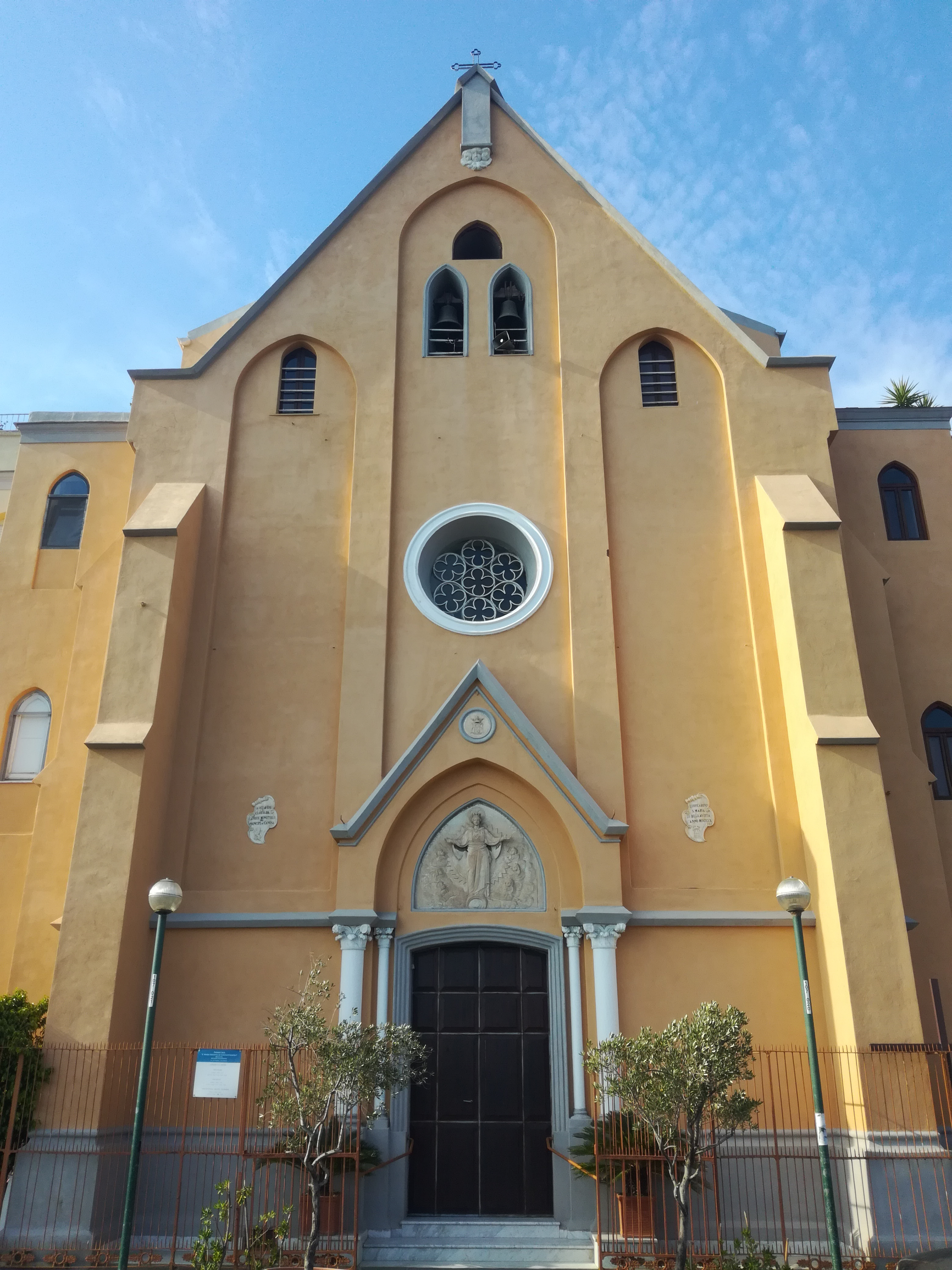 Chiesa di Santa Maria di Bellavista (Napoli)